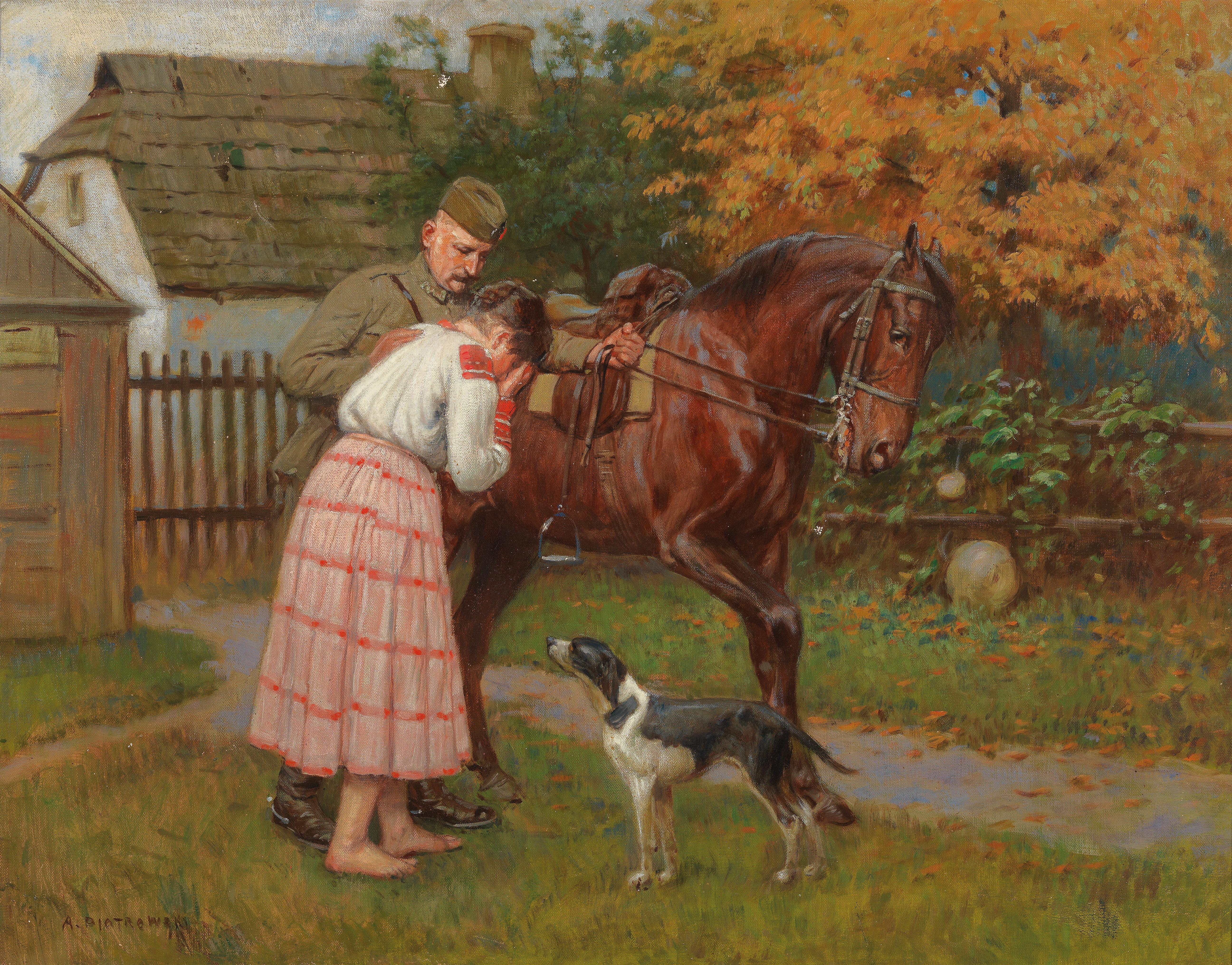 Die Abreise, signiert A. Piotrowski, Öl auf Leinwand, 66 x 85 cm